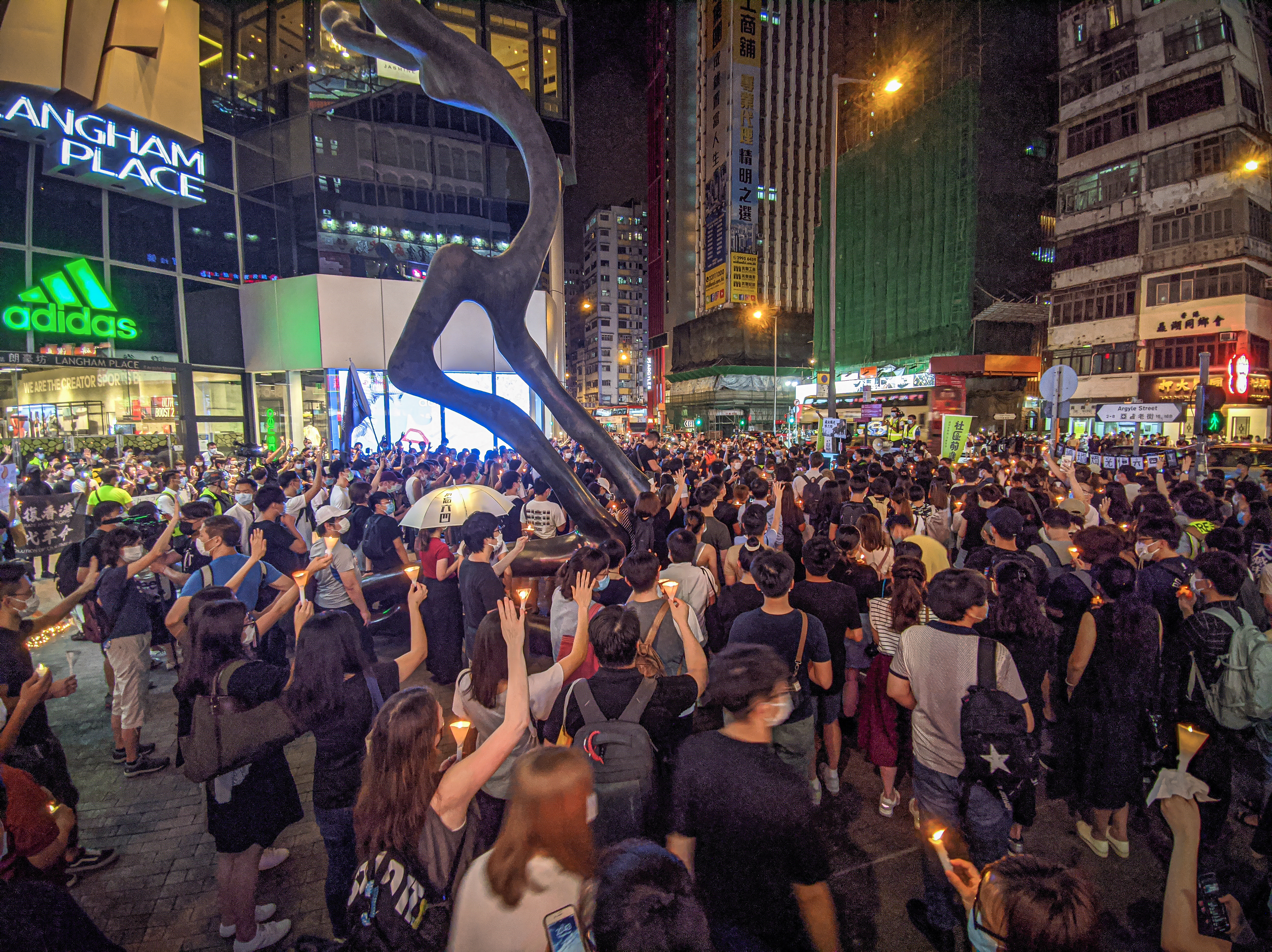 20200604-IMG_20200604_204306